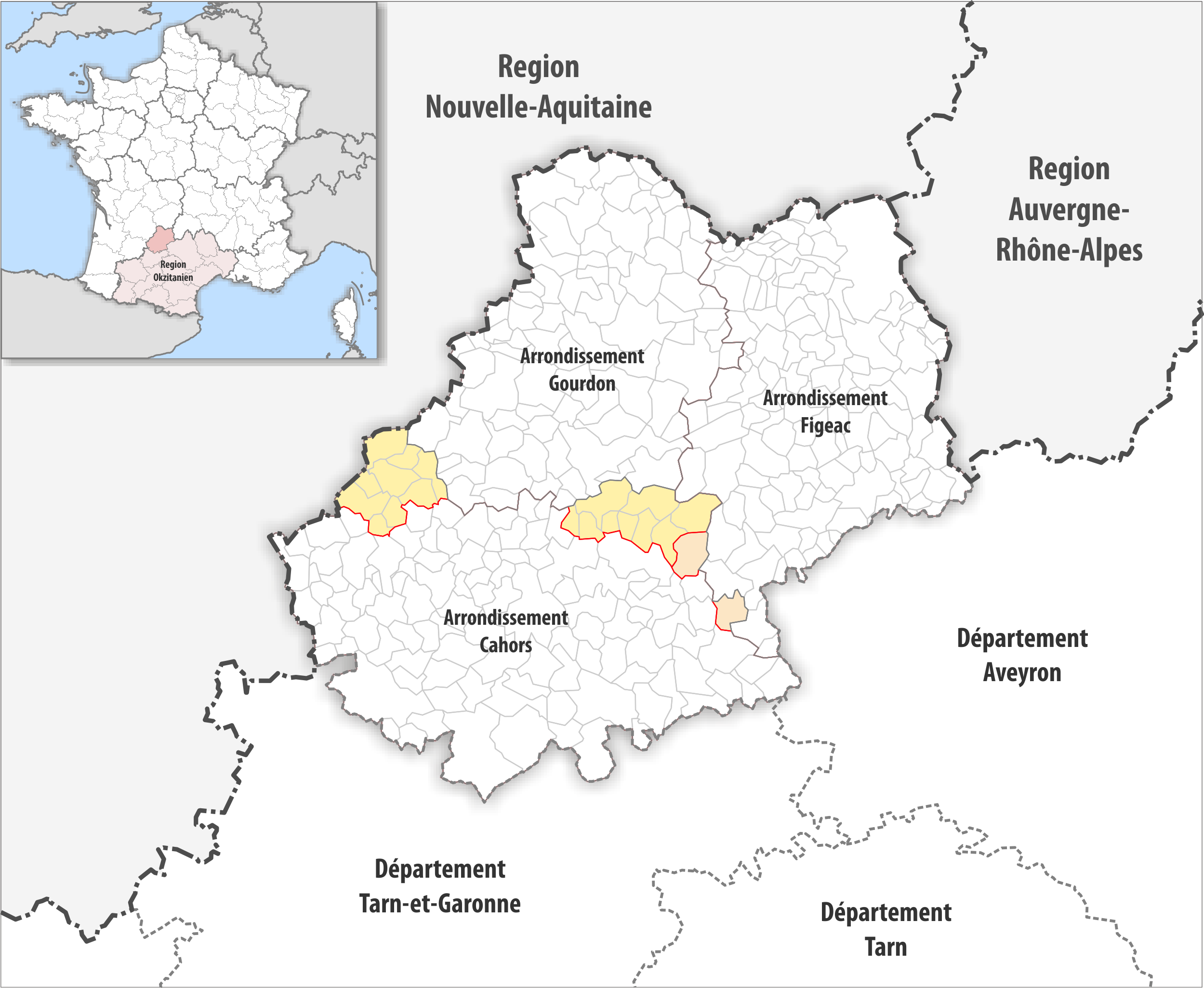 Arrondissements Anpassungen auf 2017 im Departement Lot